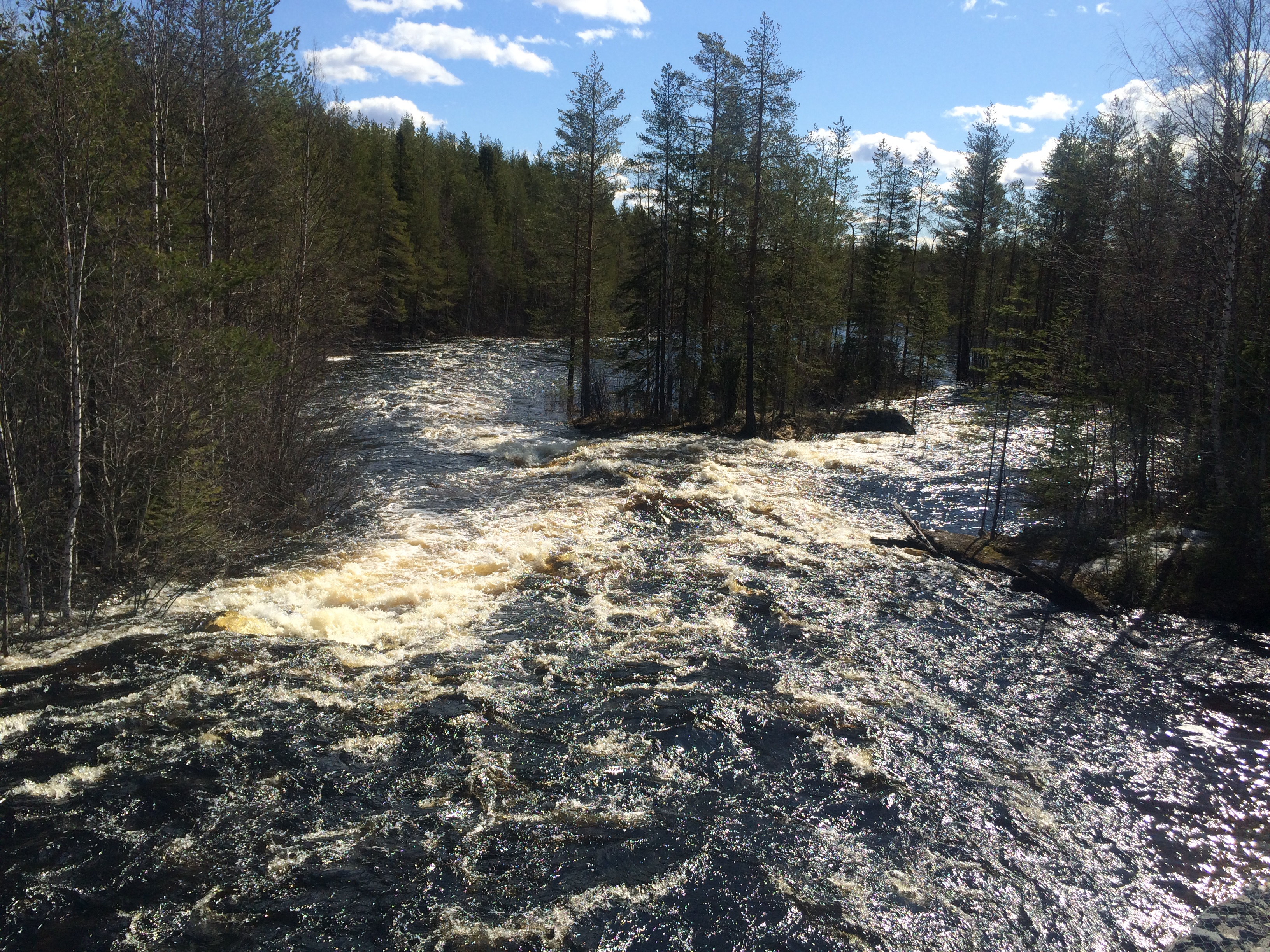 река Летняя